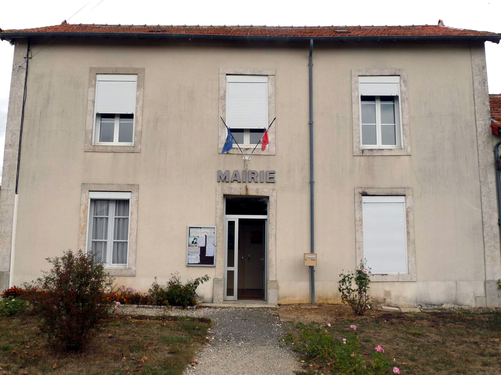 mairie du Bouchage, Charente, France